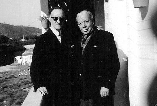 Mario_Nascimento_e_Idalecio_Cabecinha_1966. Mário Nascimento numa das suas últimas fotos, com o amigo Idalécio. Setúbal 1966.